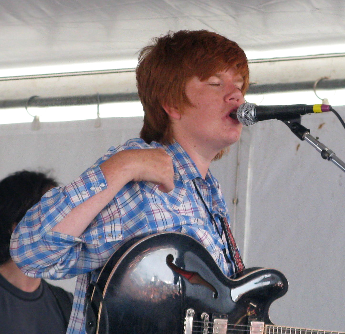 Brett Dennen at Newport Folk Festival 2009